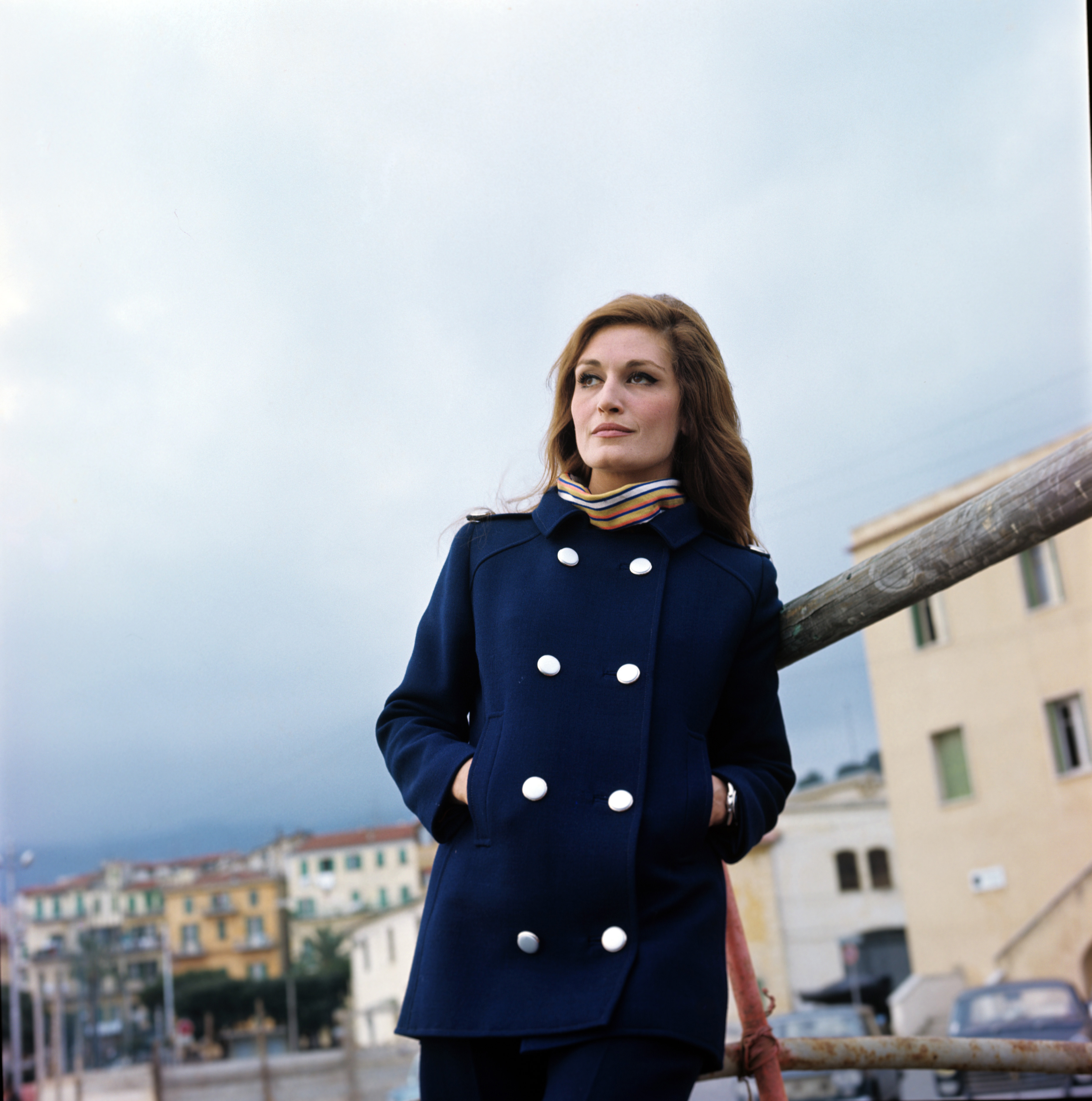 Dalida en janvier 1967 à San Remo en Italie.